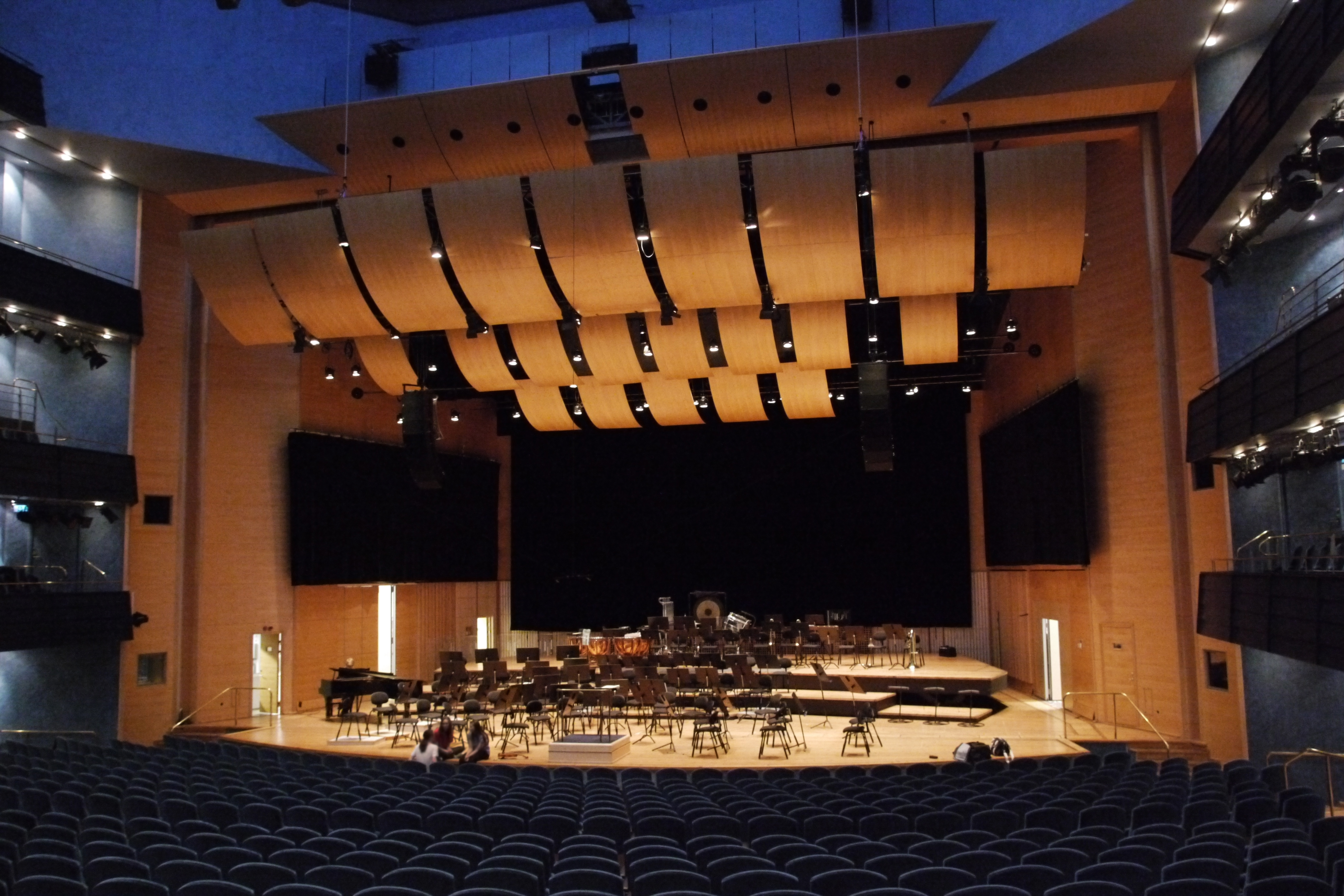 Louis de Geer-hallen scen